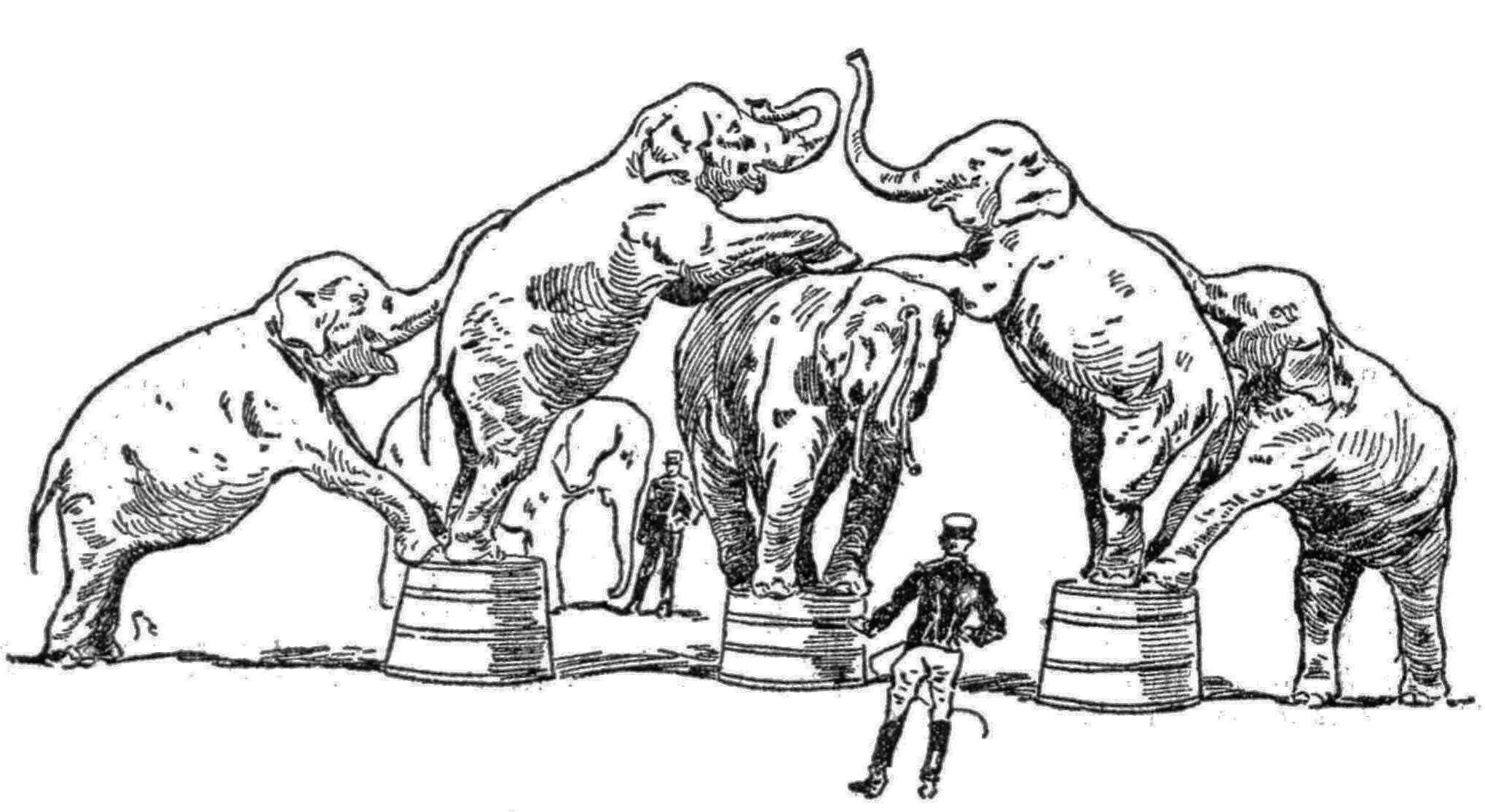 "Quelques-uns des éléphants savants" [du cirque Barnum & Bailey].